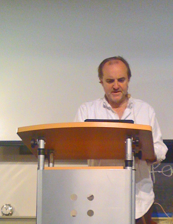 Peter Schneider (Psychoanalytiker und Satiriker) 2010